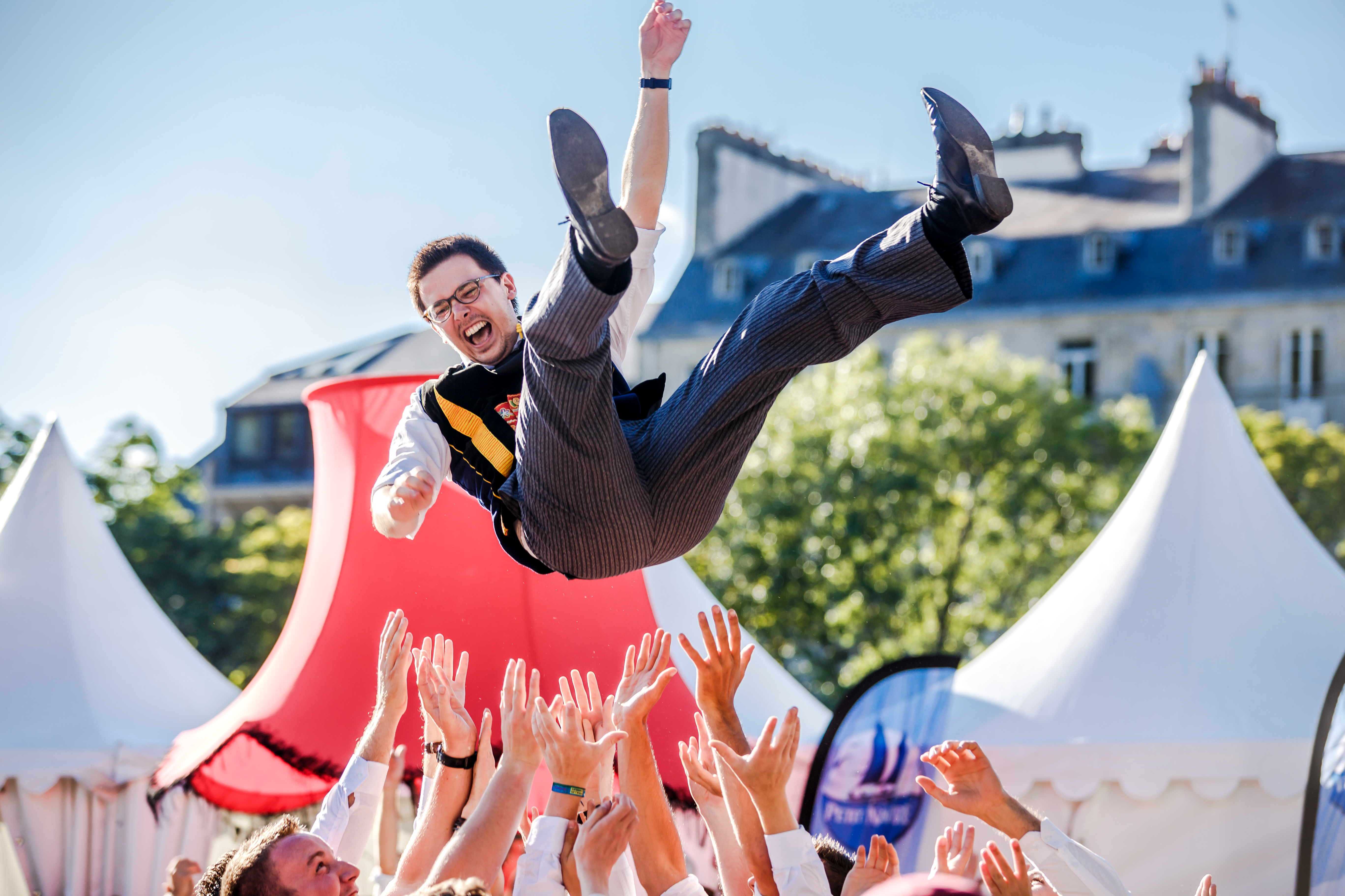 Résultats du championnat national des bagadoù de 3e catégorie au Festival de Cornouaille à Quimper le 23 juillet 2016.